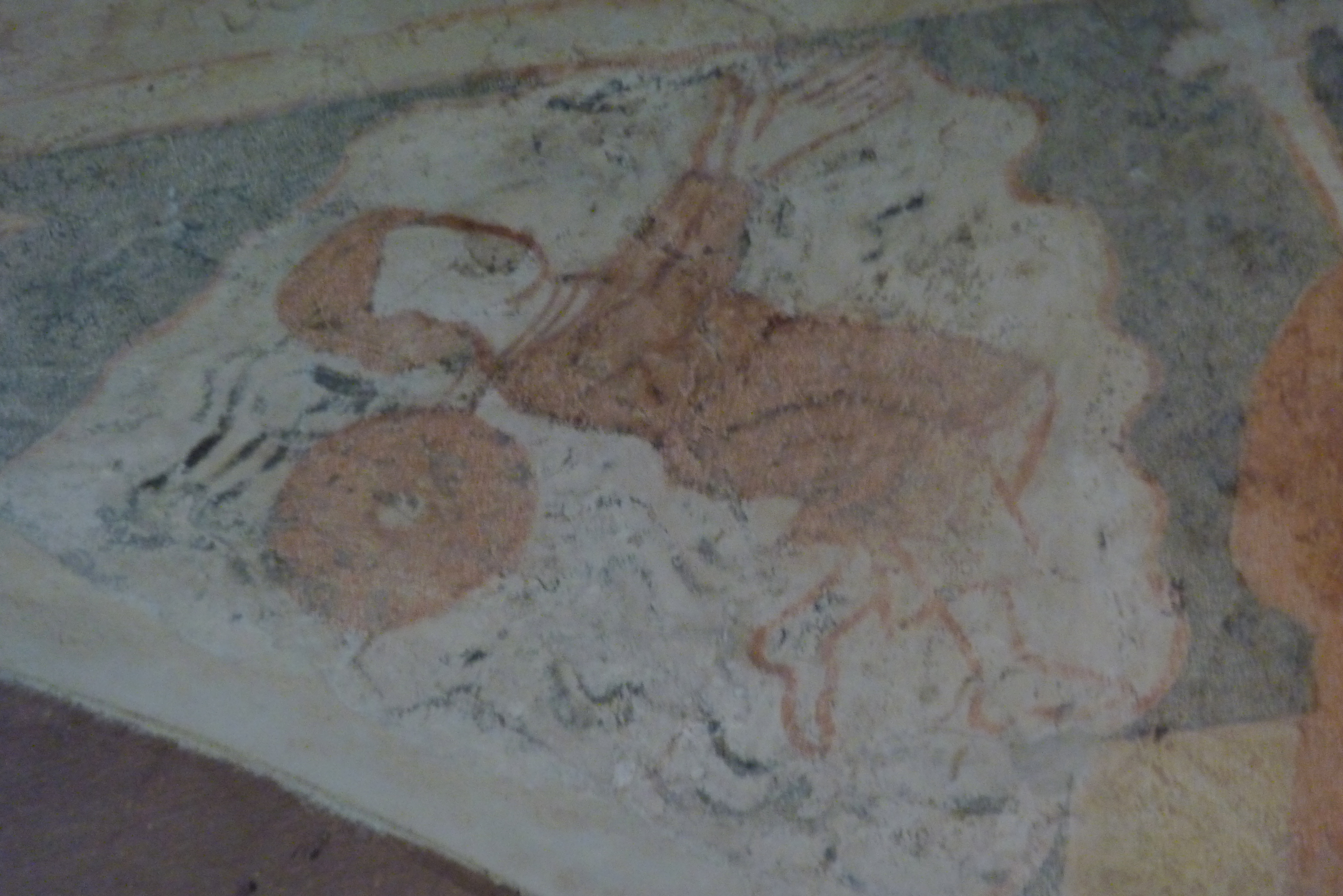 Evangelische Kirche in Fraurombach, einem Stadtteil von Schlitz im Vogelsbergkreis (Hessen), gotische Wandmalerei aus der ersten Hälfte des 14. Jahrhunderts, Darstellung: Szene des Herakliuszyklus